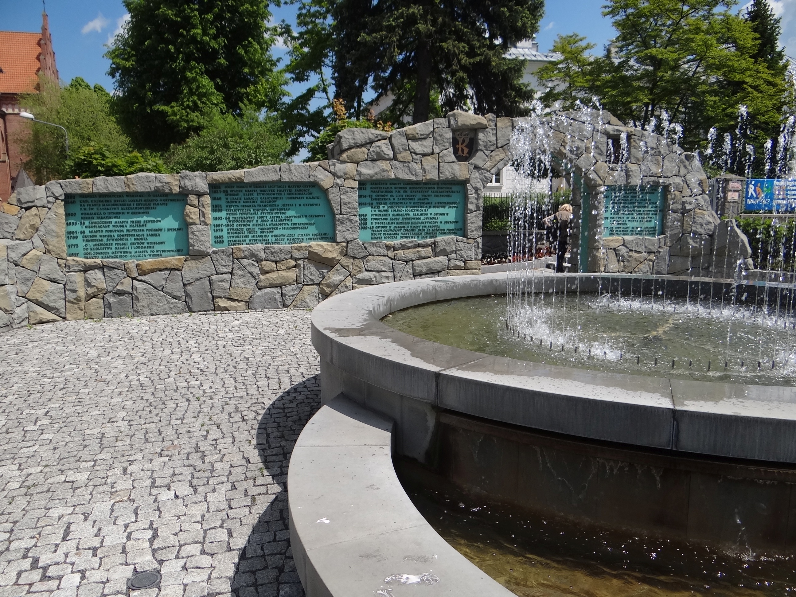 Centrum Grybowa. Historia miejscowości